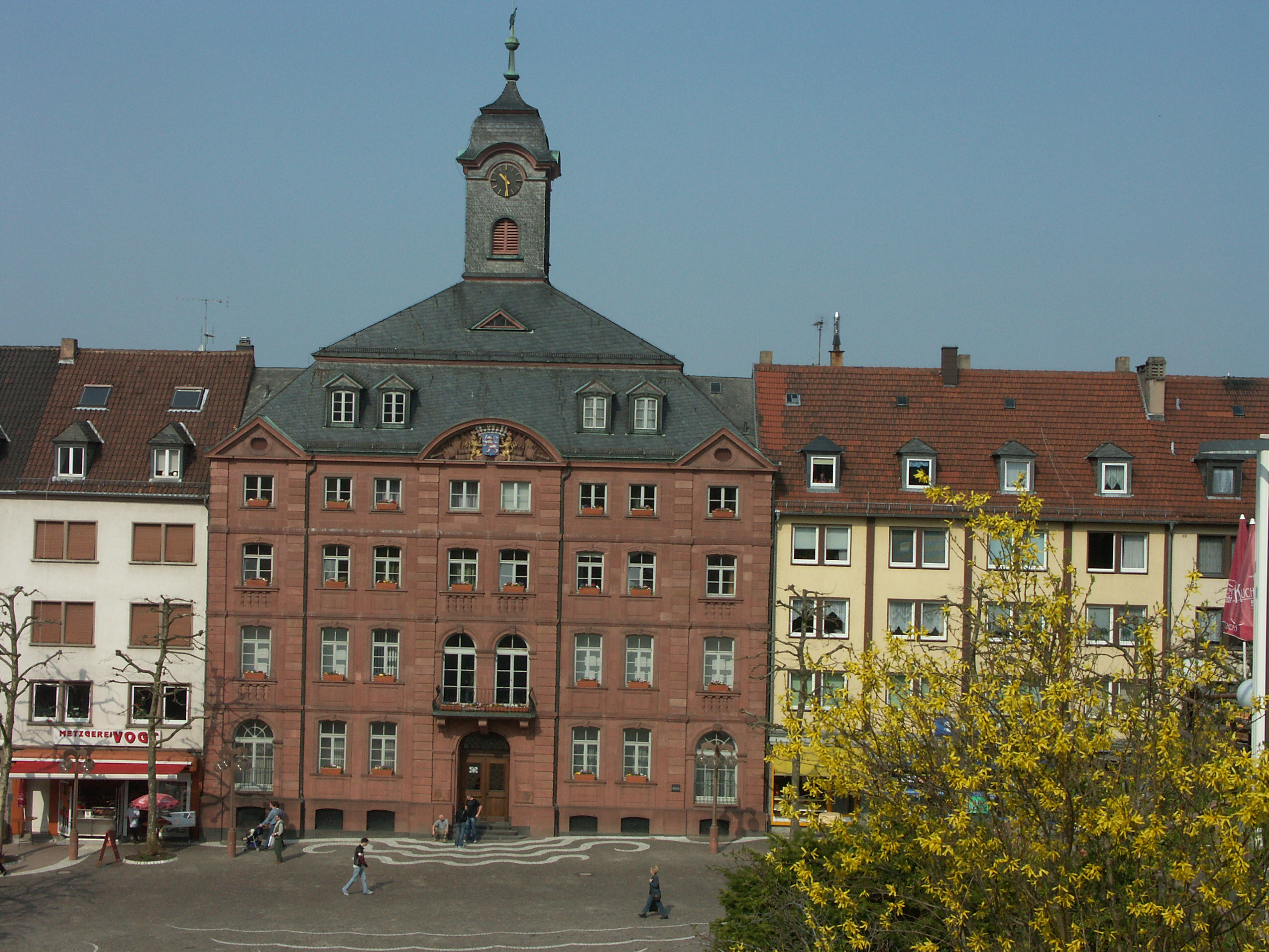 Pirmasens "Altes Rathaus"